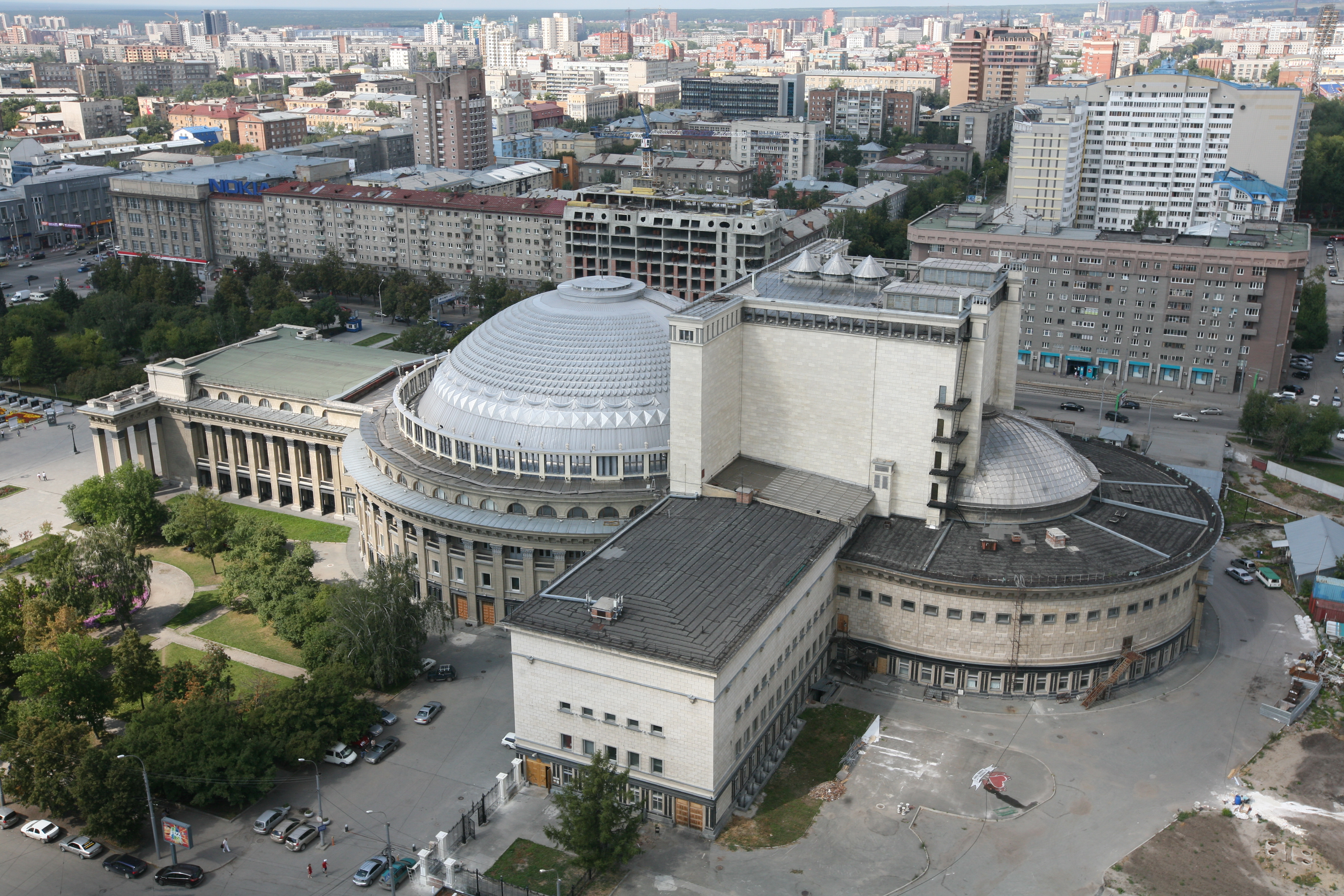 Здание Новосибирского театра оперы и балета: Красный проспект, 36, Центральный район, Новосибирск, Новосибирская область